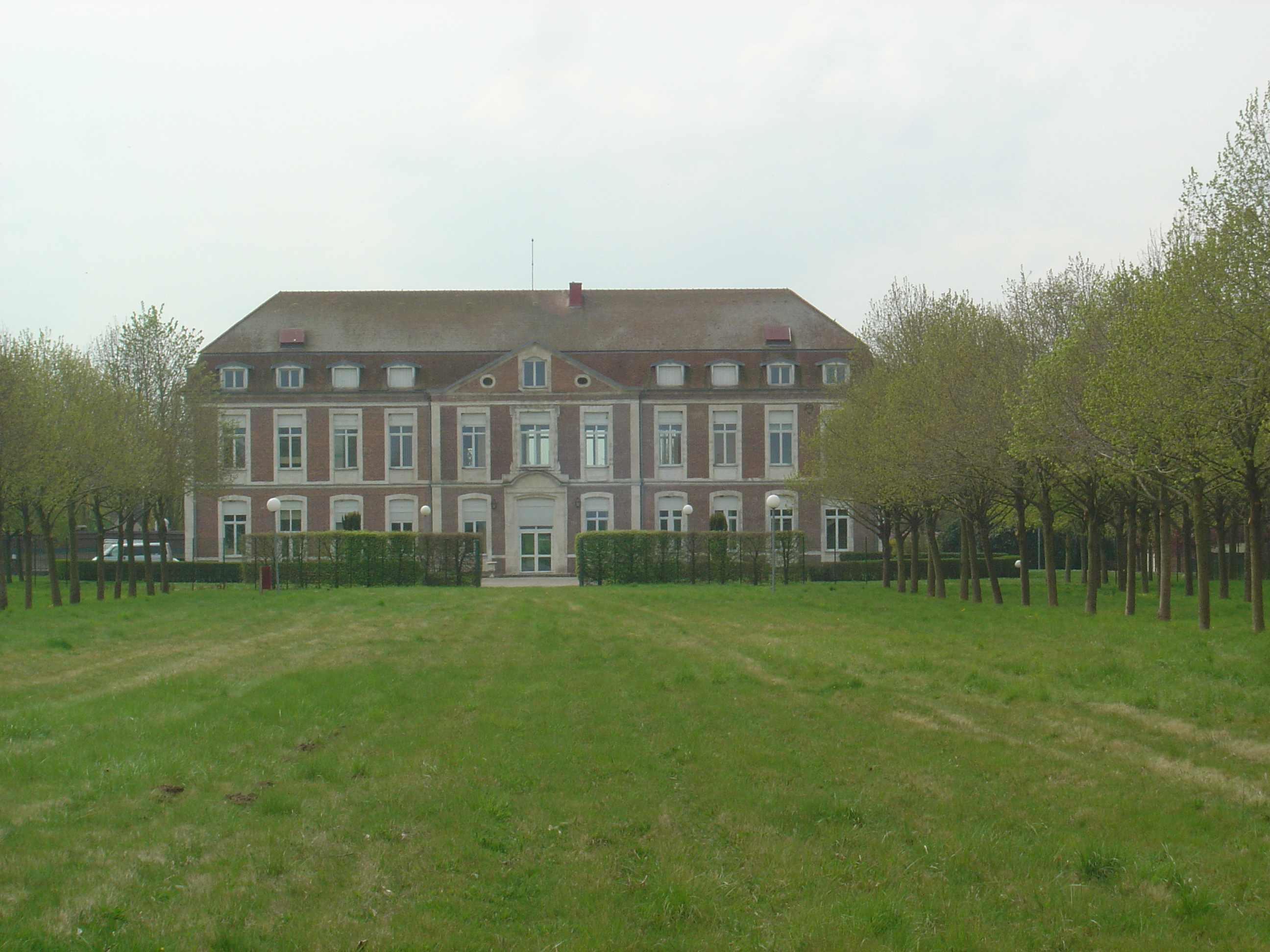 Château de Bérou sur le commune de Guichainville 27-Eure (France)